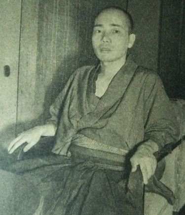 花村元司